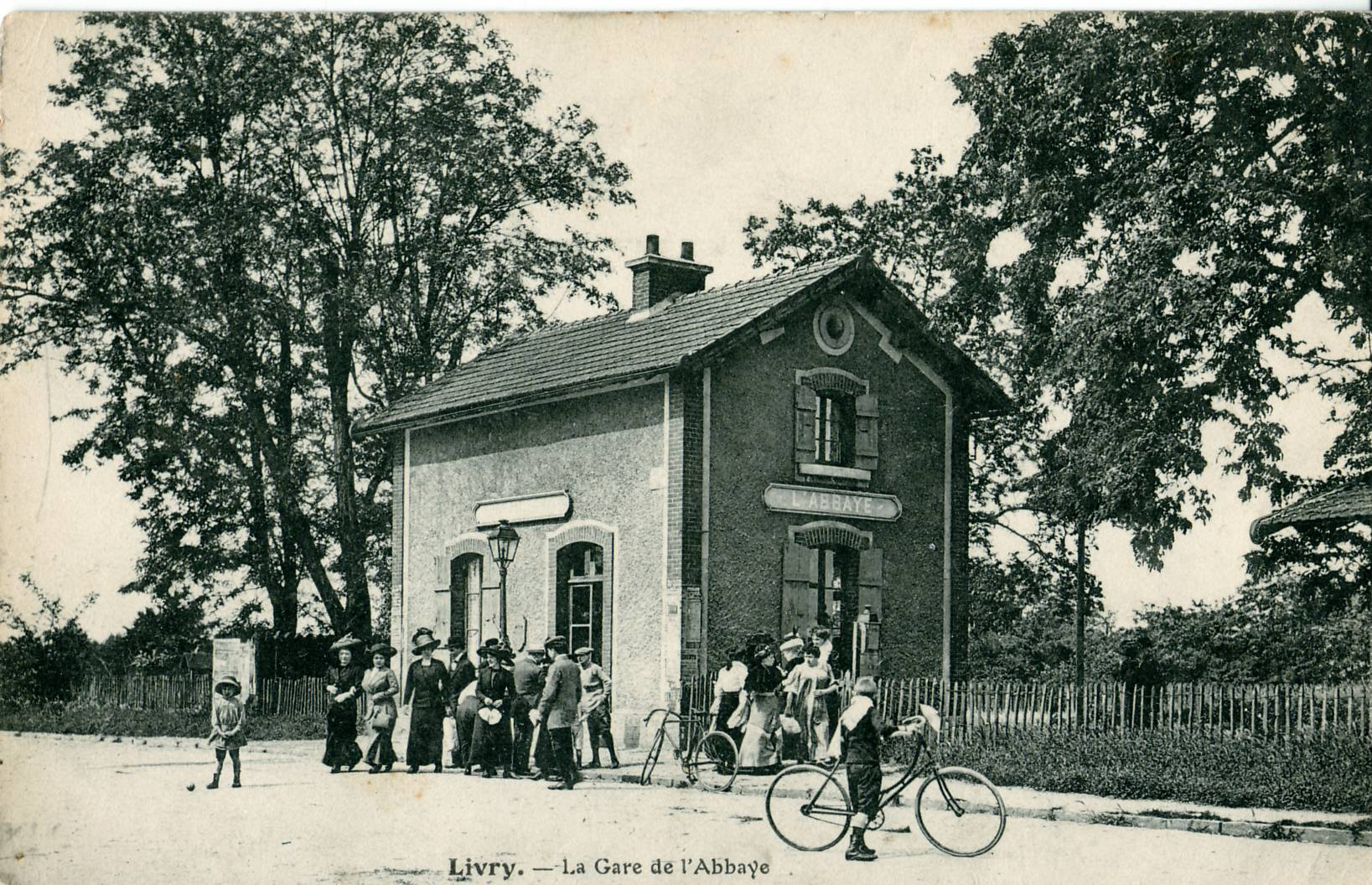 carte postale ancienne : LIVRY : La gare de L'Abbaye